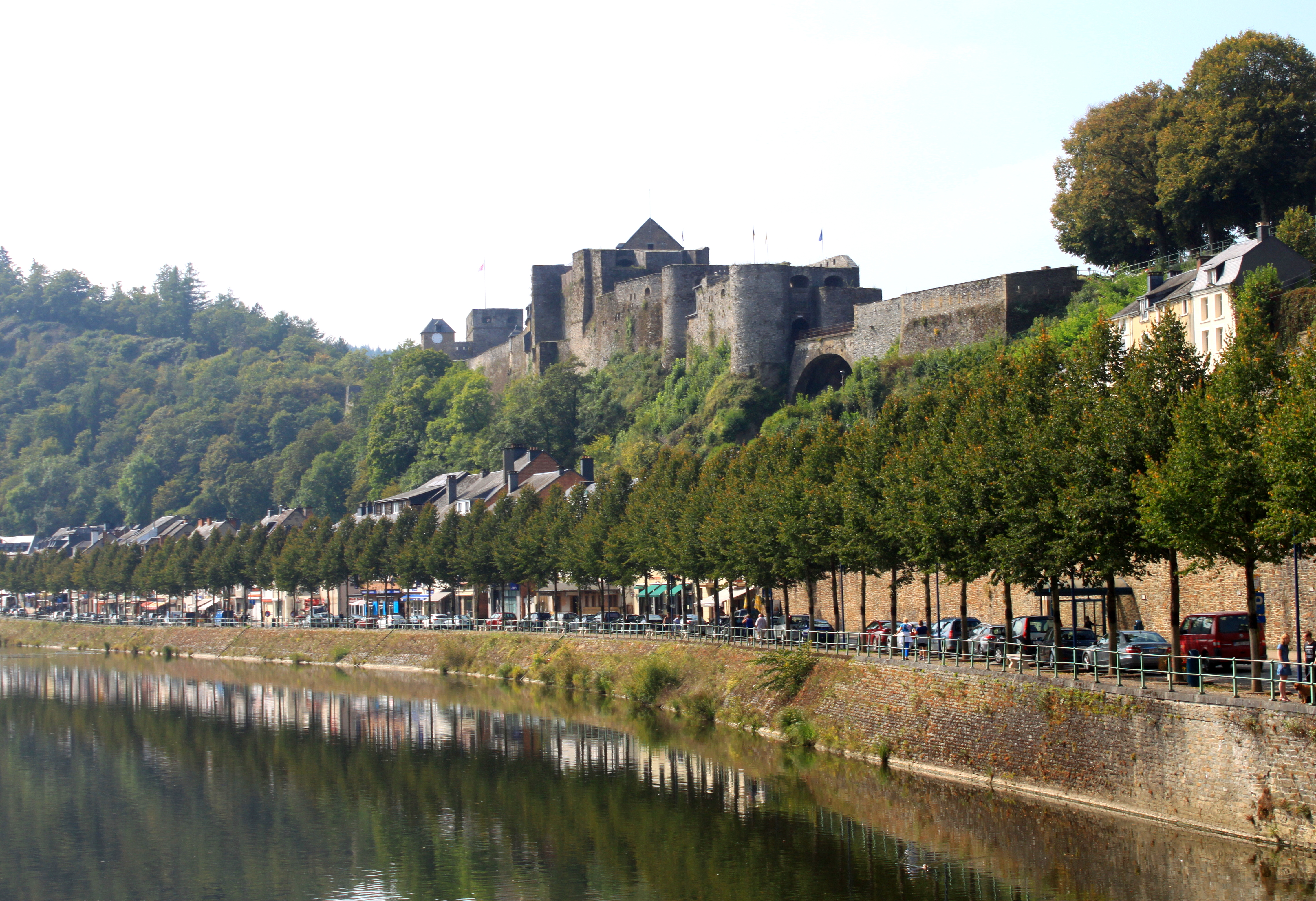 Ville de Bouillon et son château en arrière-plan.